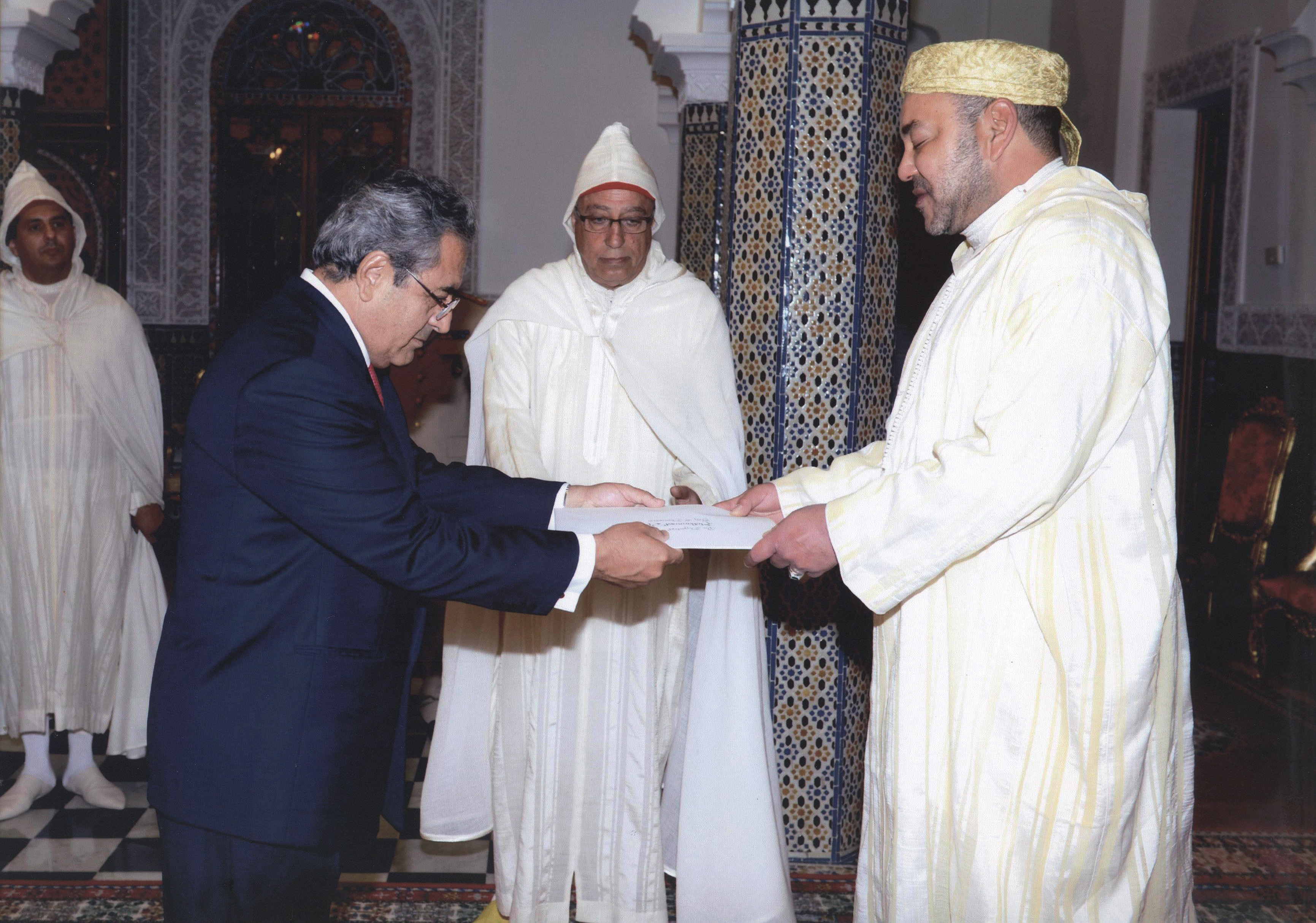 El Embajador de nuestro país en el Reino de Marruecos, Carlos Velasco Mendiola, presentó sus Cartas Credenciales ante el Rey Mohammed VI, en una ceremonia realizada el pasado 5 de julio en el Palacio Real de Tetuán. Luego de la ceremonia, en la que el embajador peruano expresó el deseo del gobierno peruano de estrechar las relaciones de amistad y cooperación entre nuestros dos países, el Ministro Delegado de Asuntos Exteriores y de Cooperación marroquí ofreció un almuerzo a nombre del monarca.